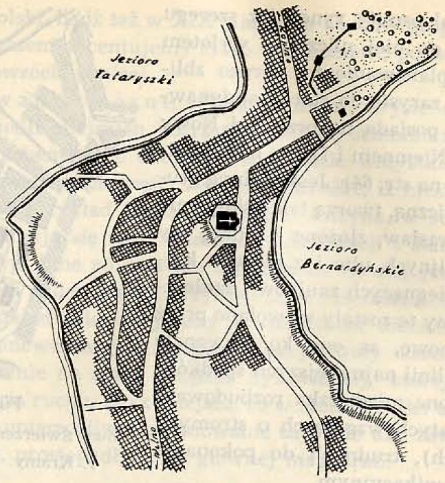 Беларуская (тарашкевіца): Трокі (Troki). Плян места